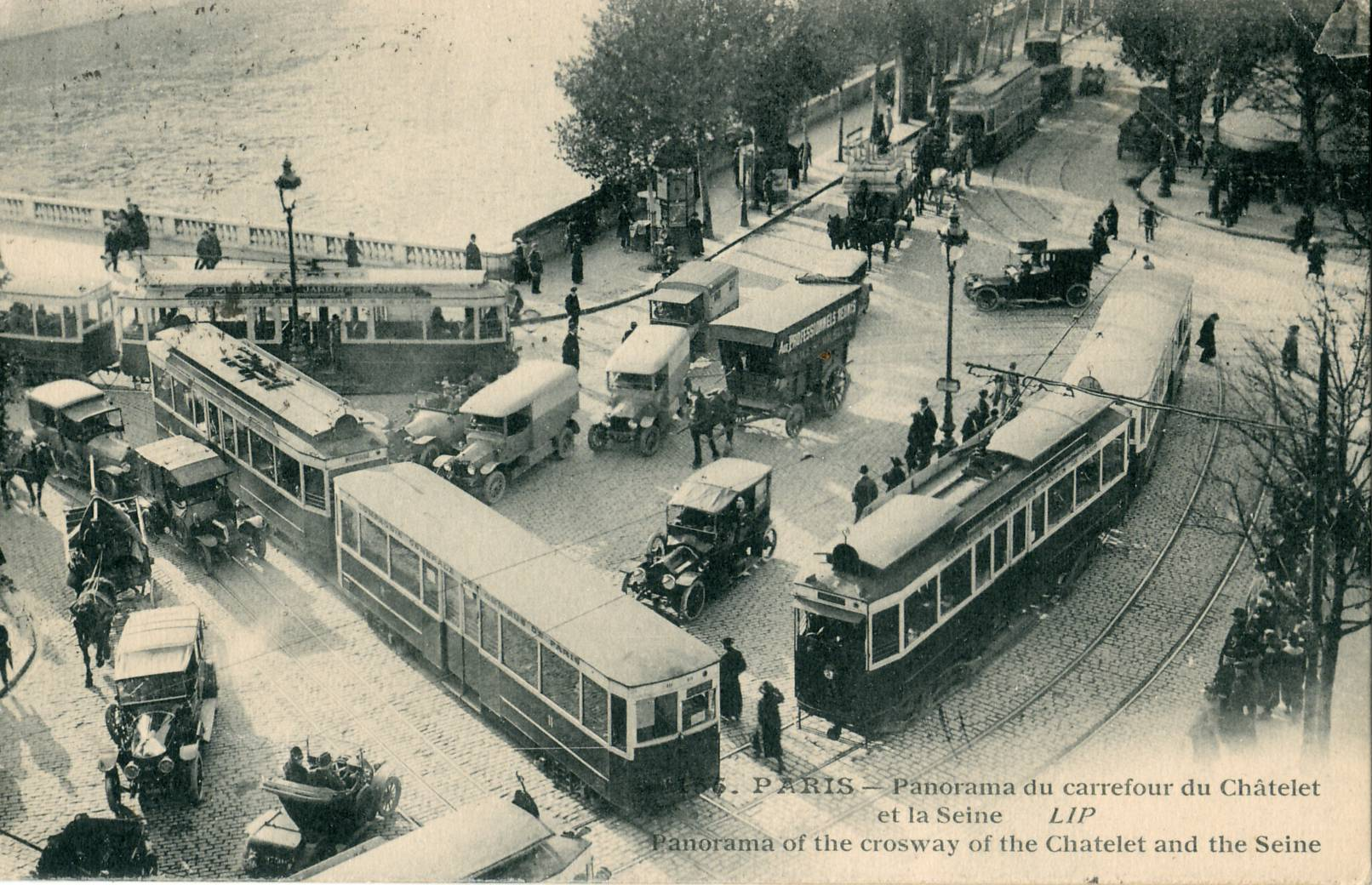 Carte postale ancienne éditée par Cormault, N°136Paris : Panorama du Carrefour du Châtelet et la Seine - LIPEncombrement de tramways de la CGO. Noter le tracé sinueux des voies de tramway, gênant la circulation des autres véhicules